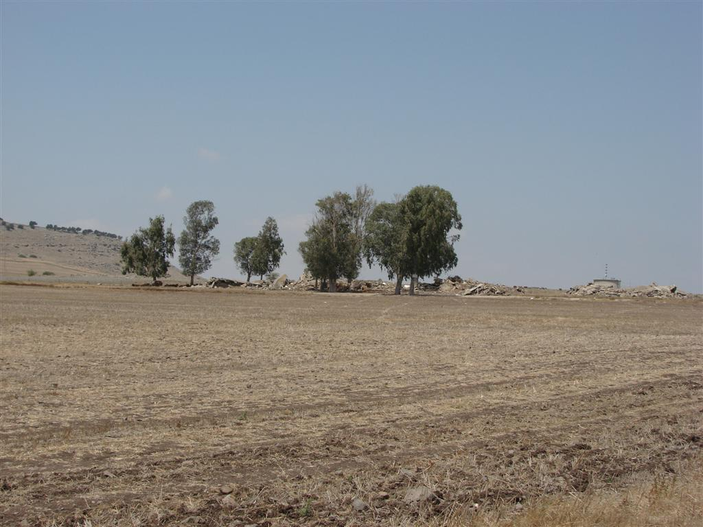 אחוזת נפתלי